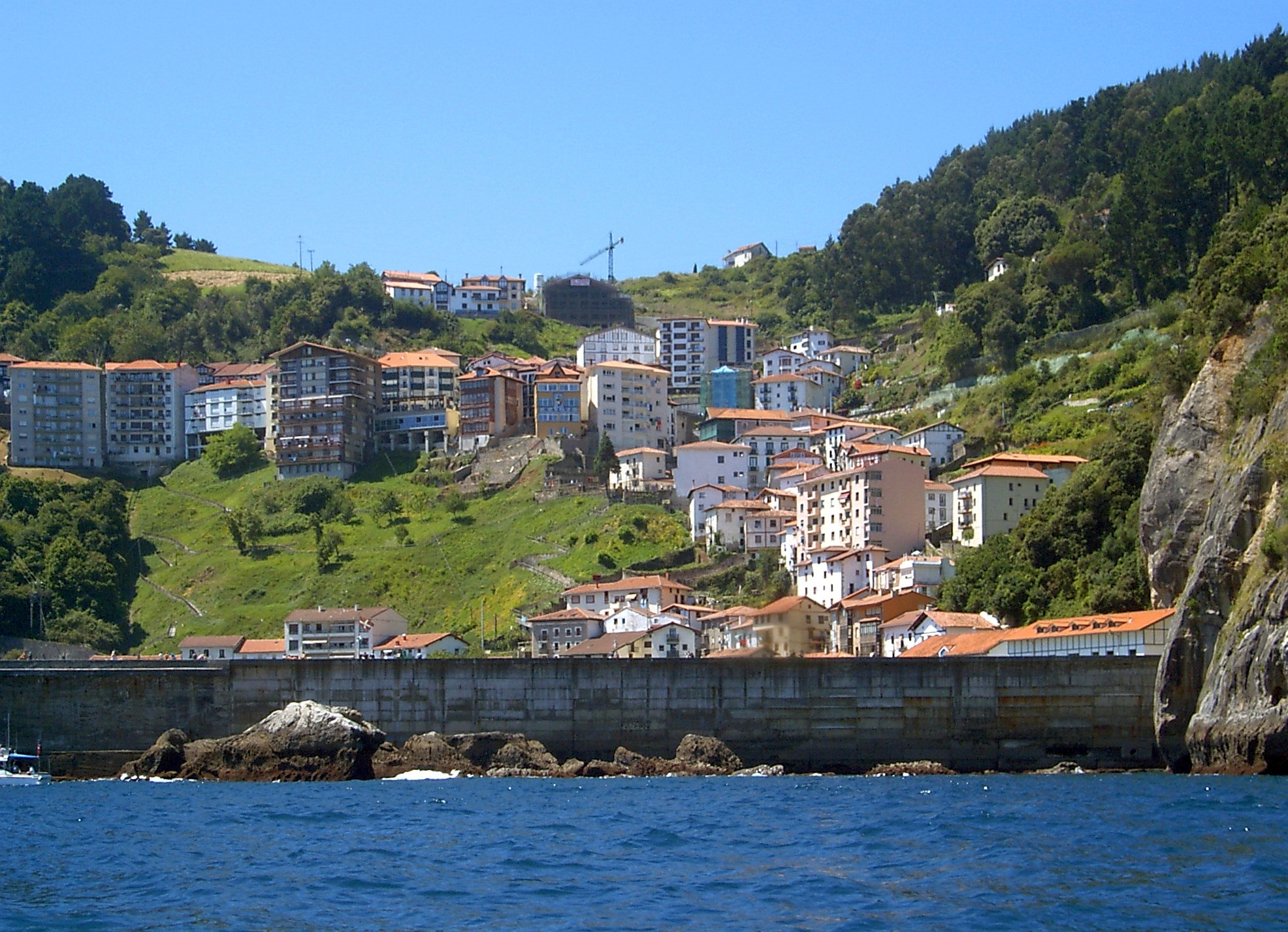 Elantxobe itsasotik